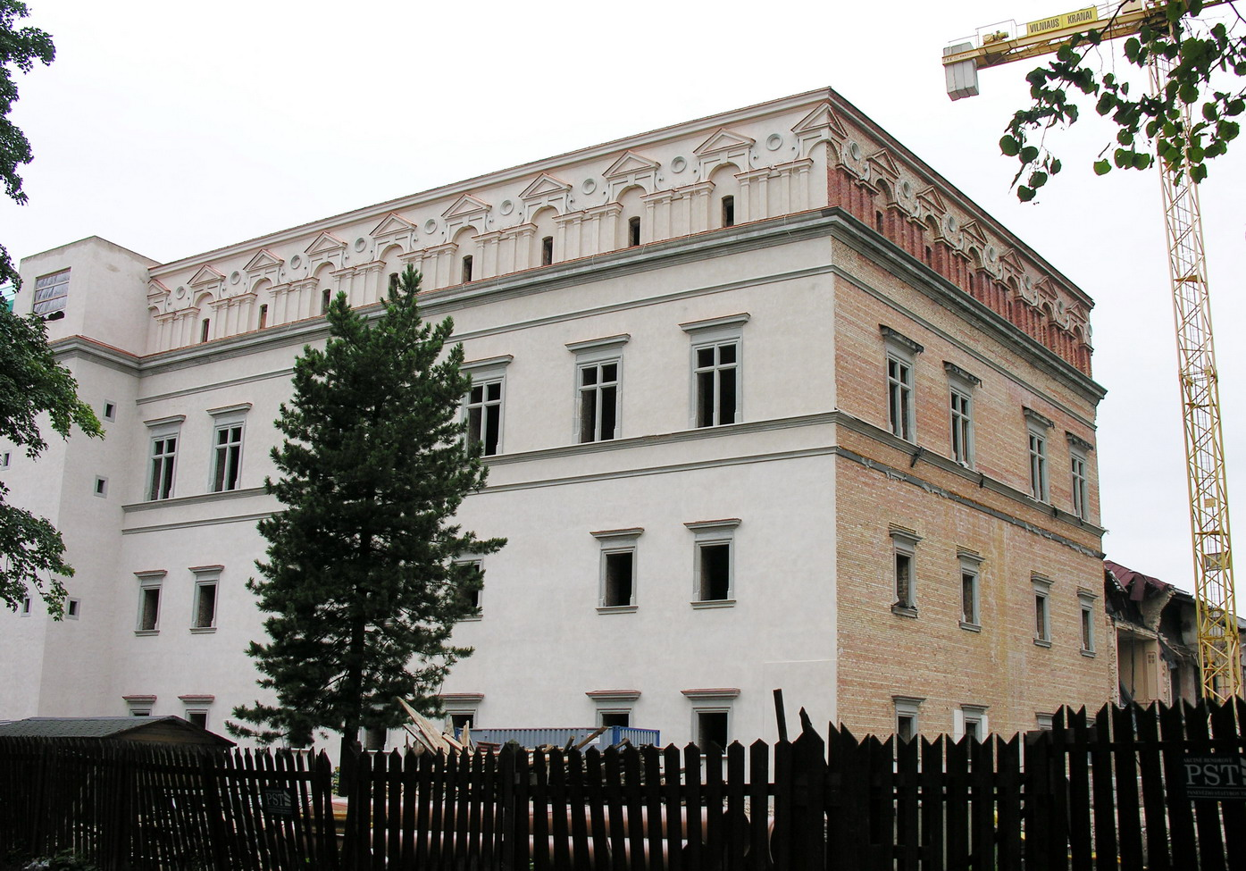 Lietuvos valdovų rūmai, atstatymo darbai 2006 m. rugpjūčio mėn. Foto: Algirdas, 2006 m. rugpjūčio 8 d., Lietuva